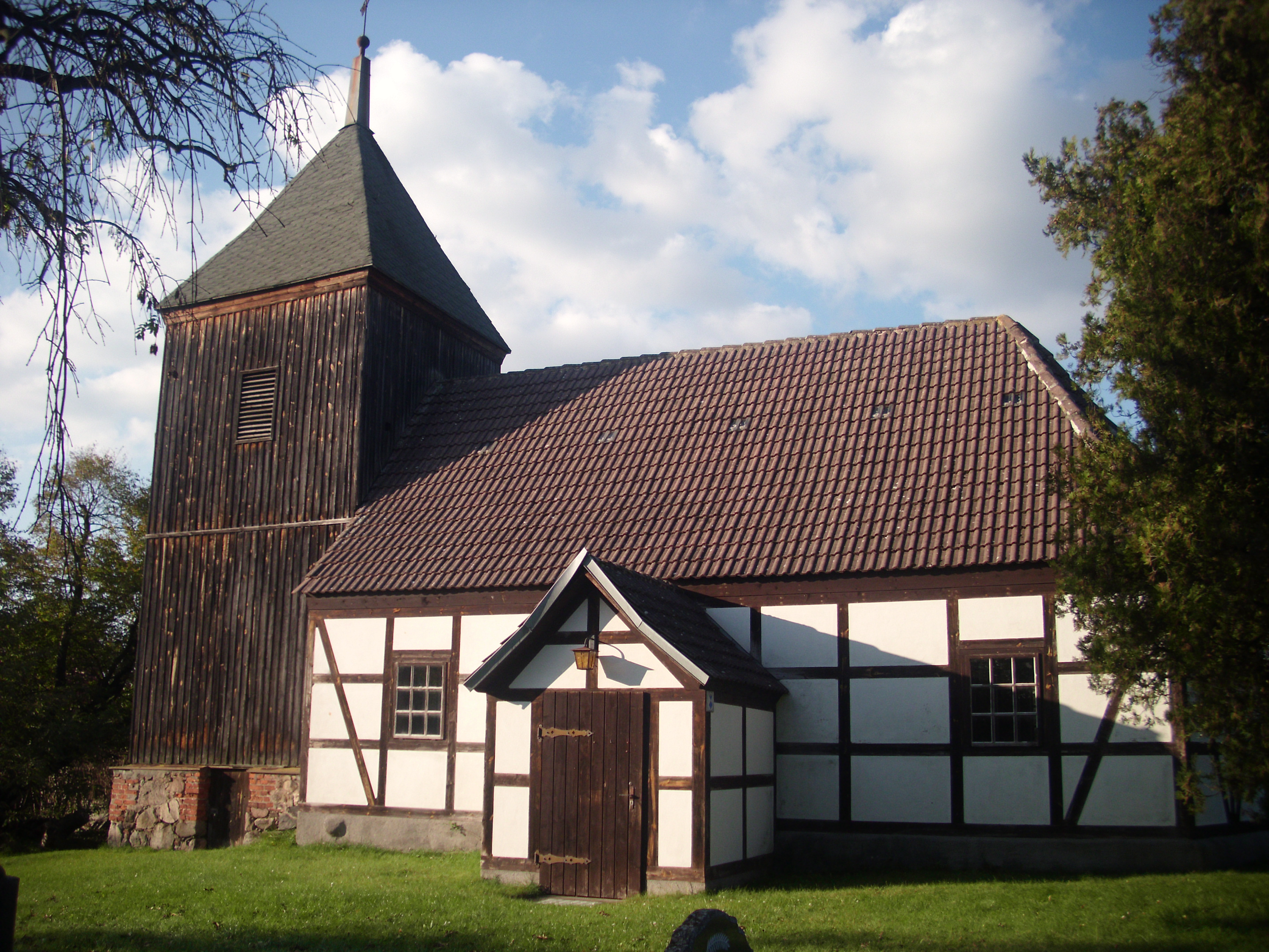 Kirche Reicherskreuz, Naturpark Schlaubetal, Brandenburg